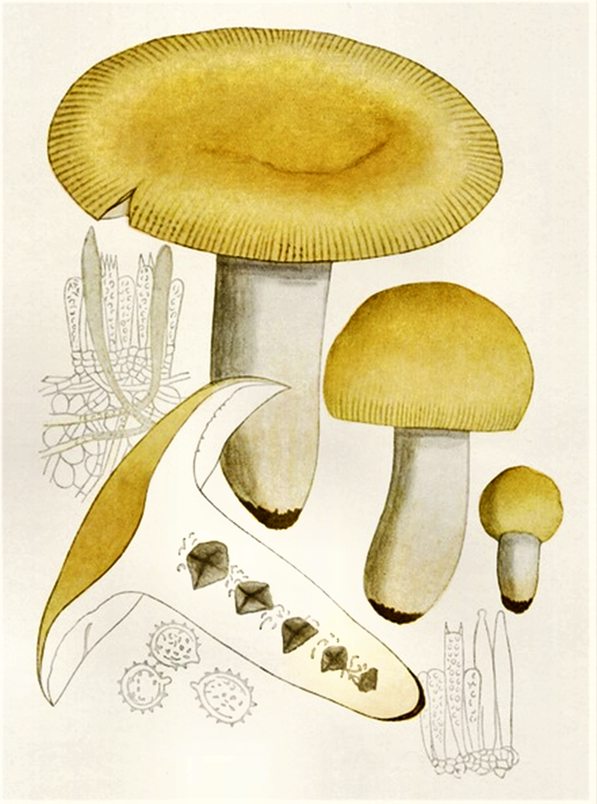 Giacomo Bresadola: Russula foetens (Christian Hendrik Persoon|Pers. , 1796)